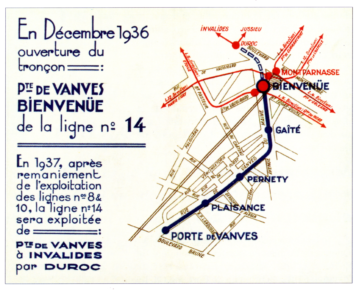 Prospectus annonçant l'ouverture de la ligne 14 (Tronçon Porte de Vanves - Bienvenüe). Ce tronçon fait désormais partie intégrante de la ligne 13.